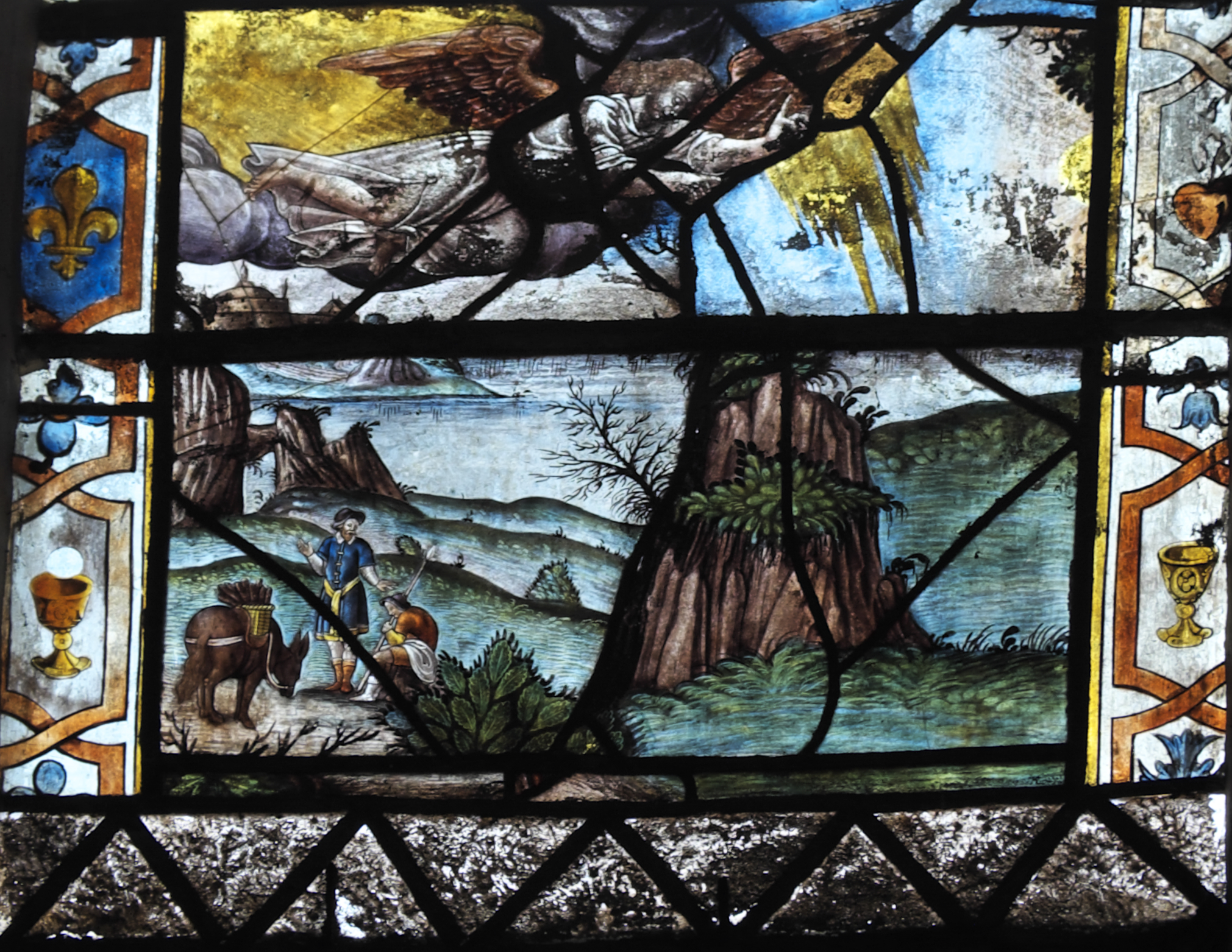 Katholische Pfarrkirche Saint-Pierre in Montfort-l'Amaury im Département Yvelines (Region Île-de-France/Frankreich), Bleiglasfenster (baie 21) aus der zweiten Hälfte des 16. Jahrhunderts; Darstellung: Erscheinung eines Engels